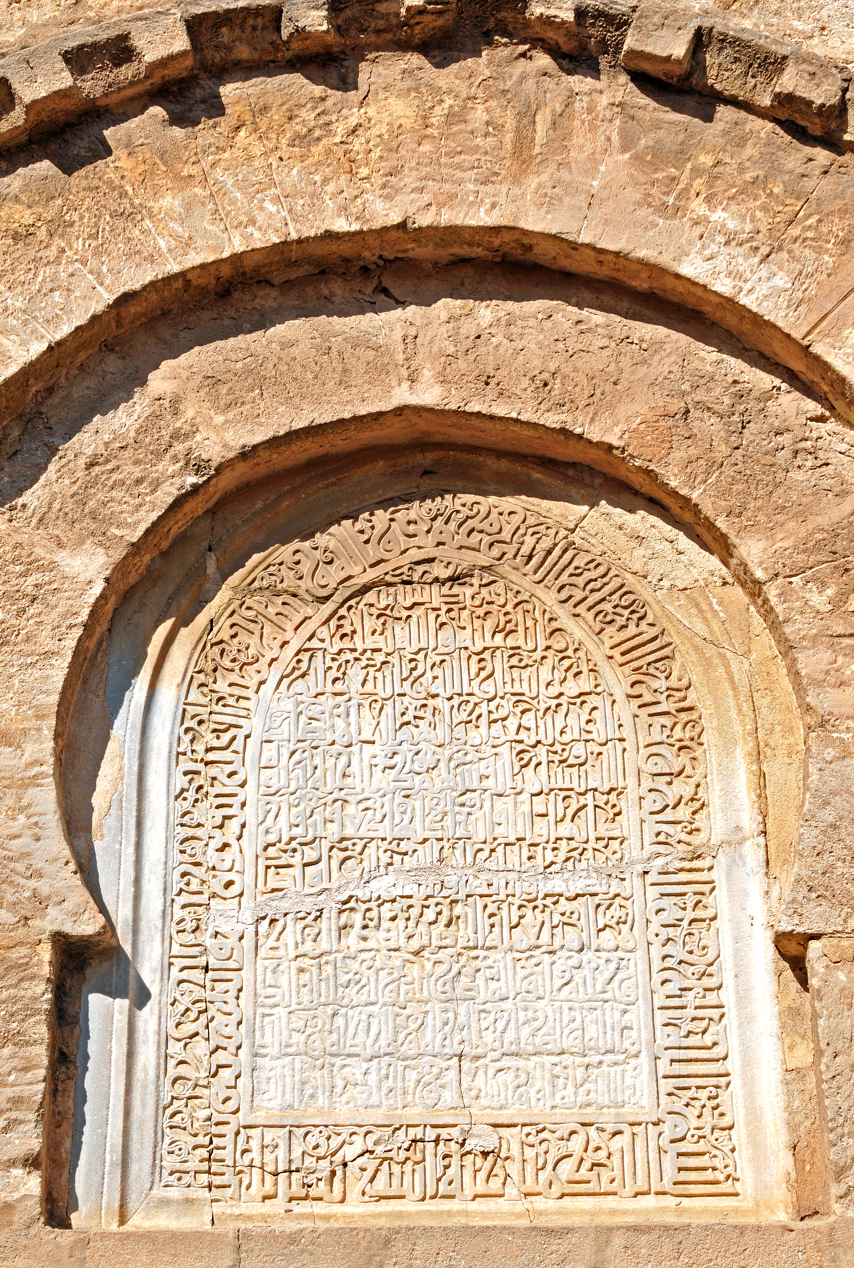 Inscription sur l'une des façades extérieures de la Grande Mosquée de Sfax, en Tunisie.